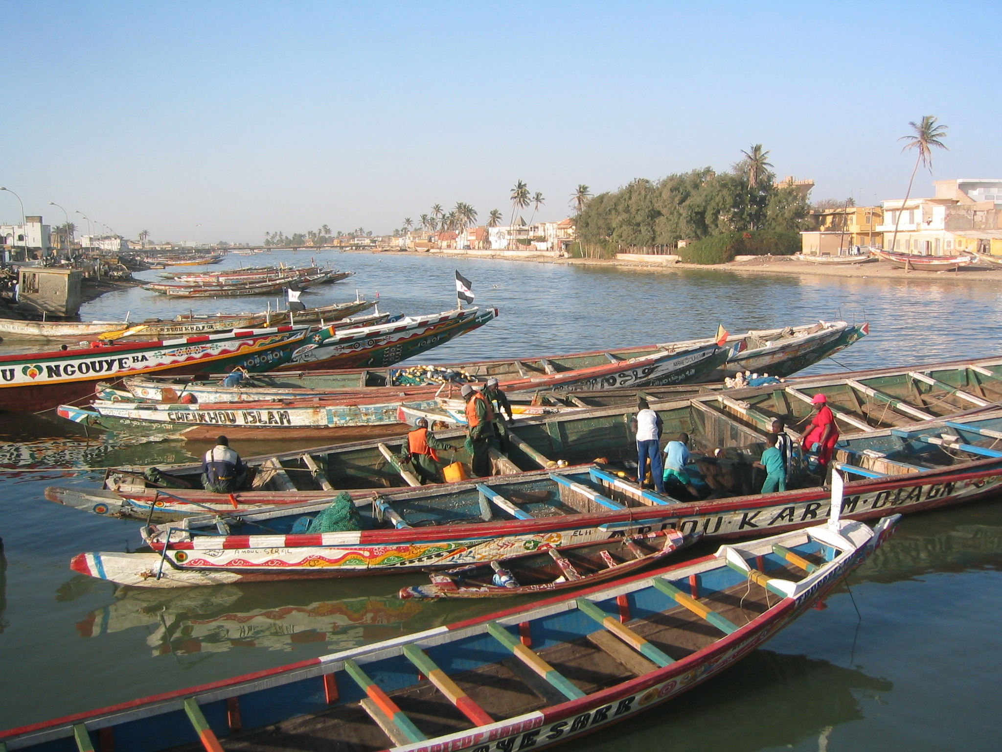 Pirogues à Saint-Louis-du-Sénégal